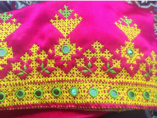 پلیور همراه با اینه از نمونه سوزن دوزی شده لبه استین